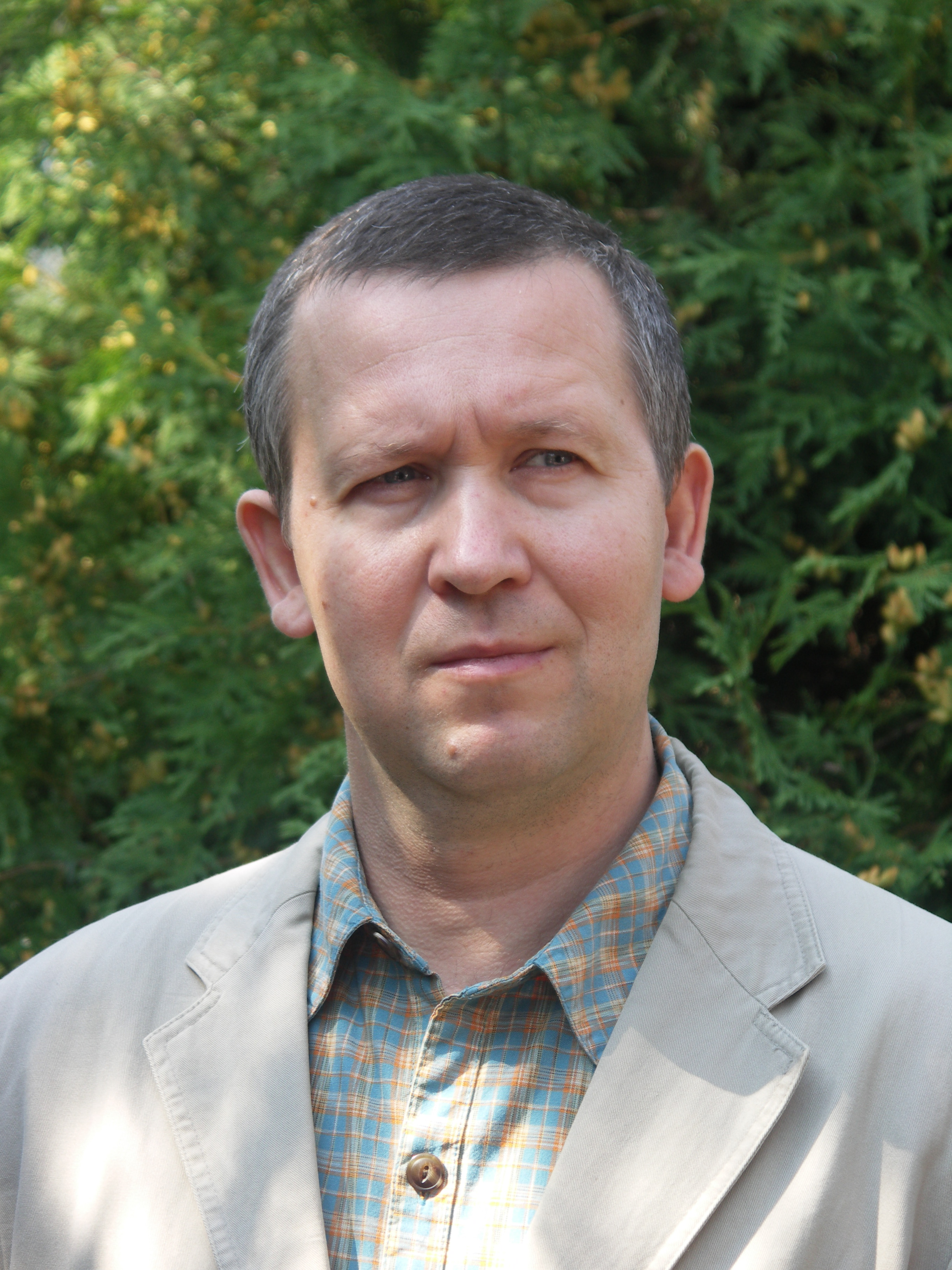 Chemik Piotr Szczęsny w swoim ogrodzie.